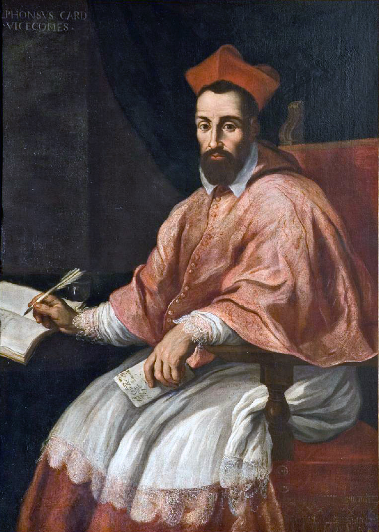 Ritratto del cardinale Alfonso Visconti